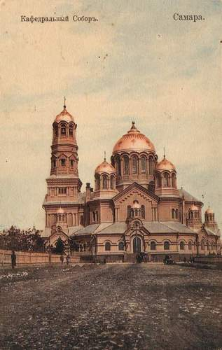 Открытка с видом Храма Христа Спасителя, Самара